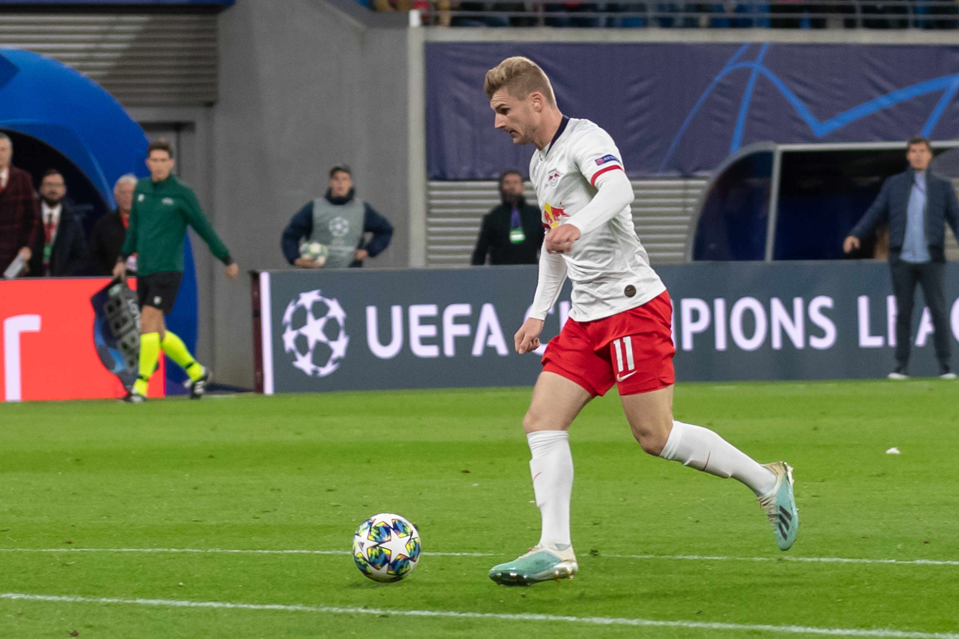 Fußball, Männer, UEFA Champions League, RB Leipzig - Olympique Lyonnais; Timo Werner (RB Leipzig, 11); Freisteller, Einzelbild, Aktion, action